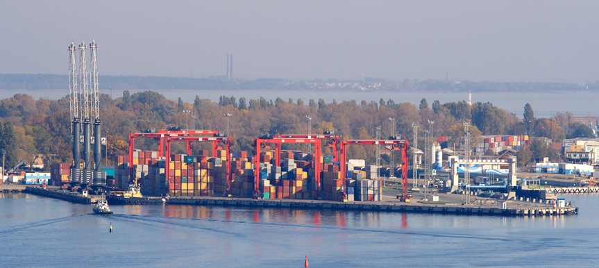 Порт Балтийск копия